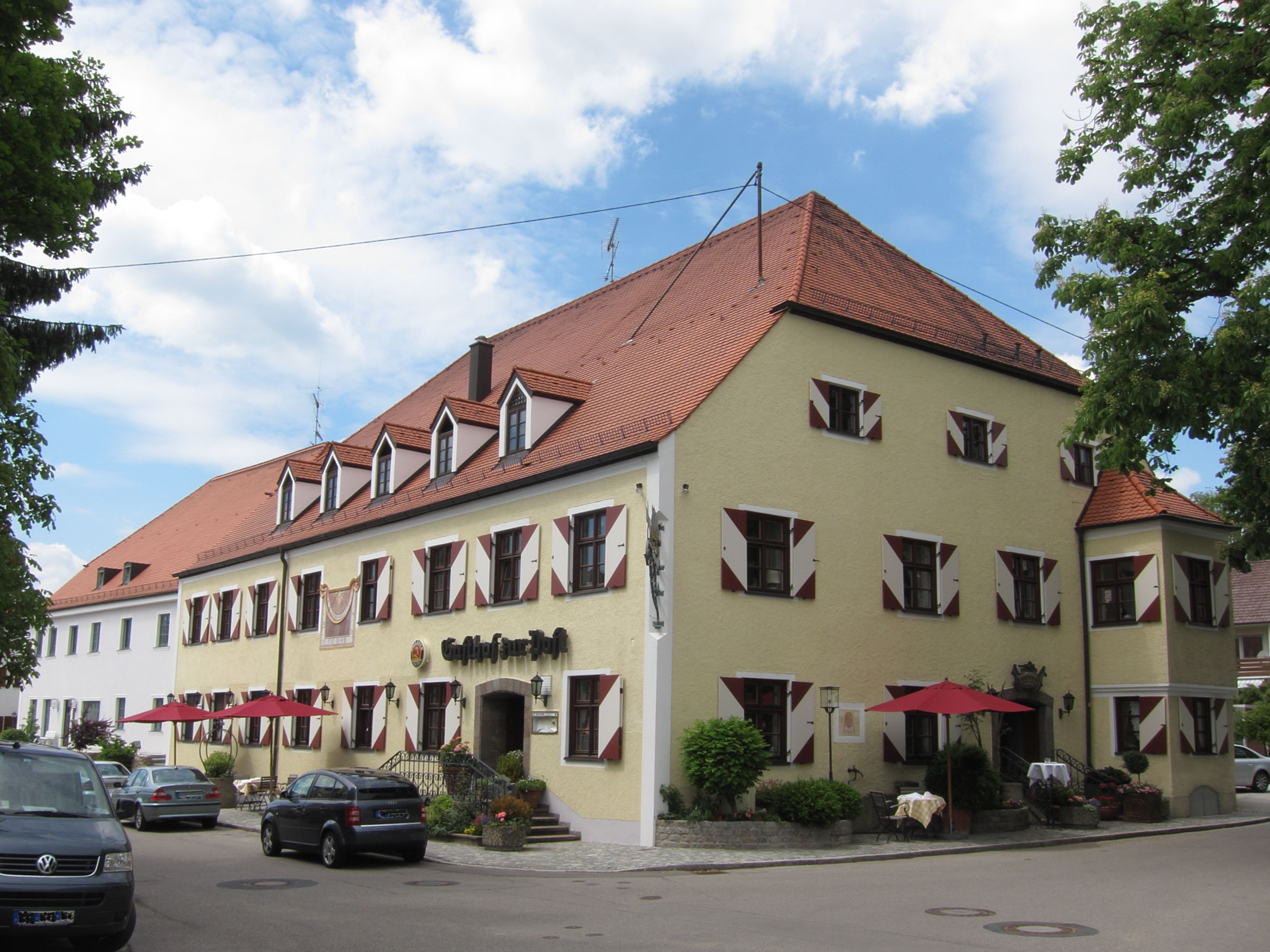 Anton-Grandauer-Str. 9; Gasthof Post, zweigeschossiger Putzbau mit Steherker und Halbwalmdach, 1803.